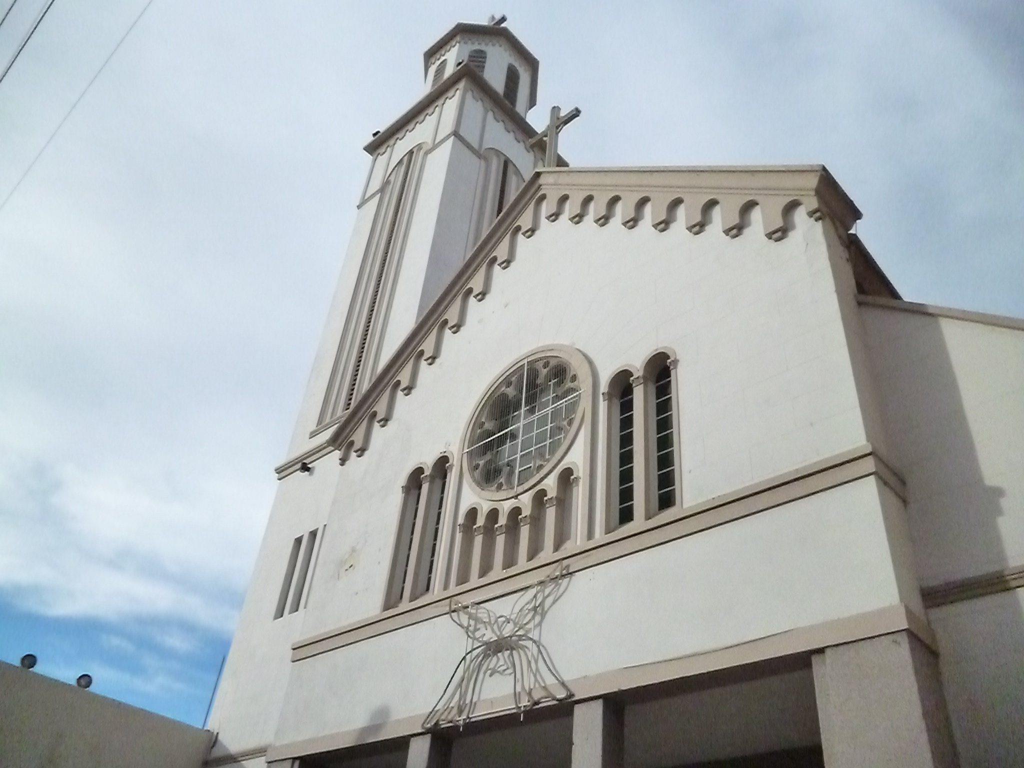 Iglesia Maria Auxiliadora en Trelew, Chubut, Argentina